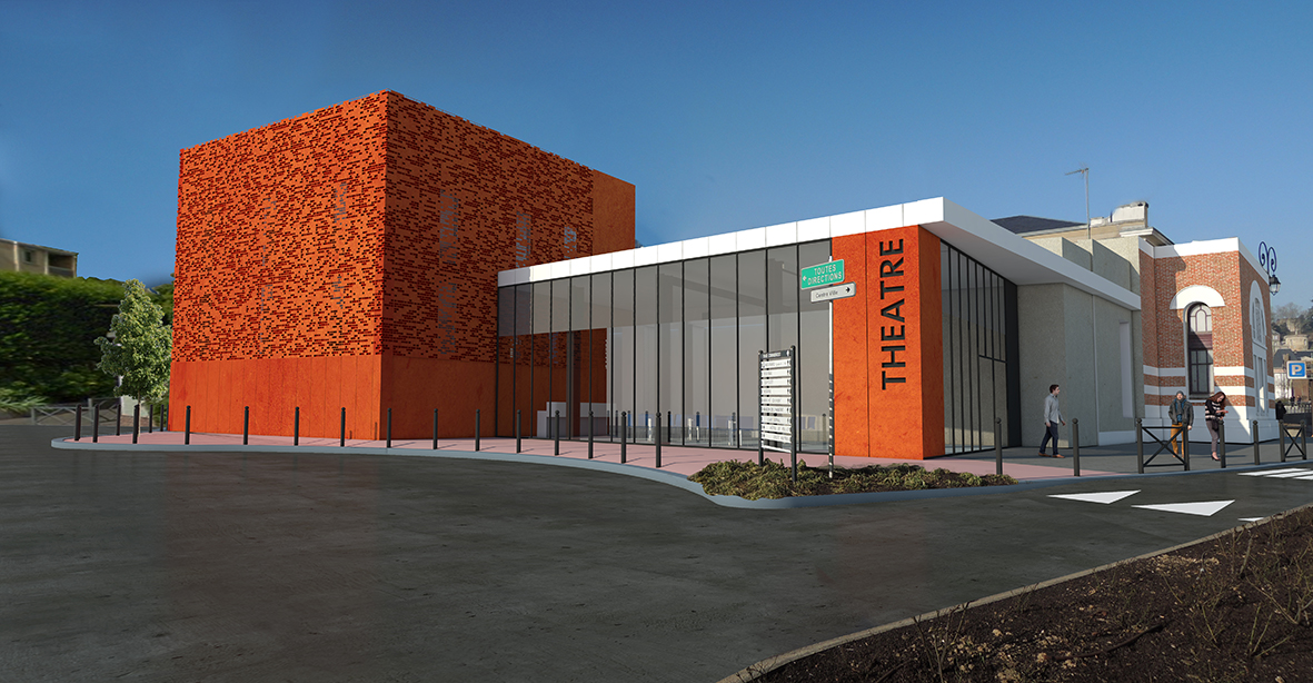 projet de création d'un nouvelle entrée pour le théâtre de Dreux